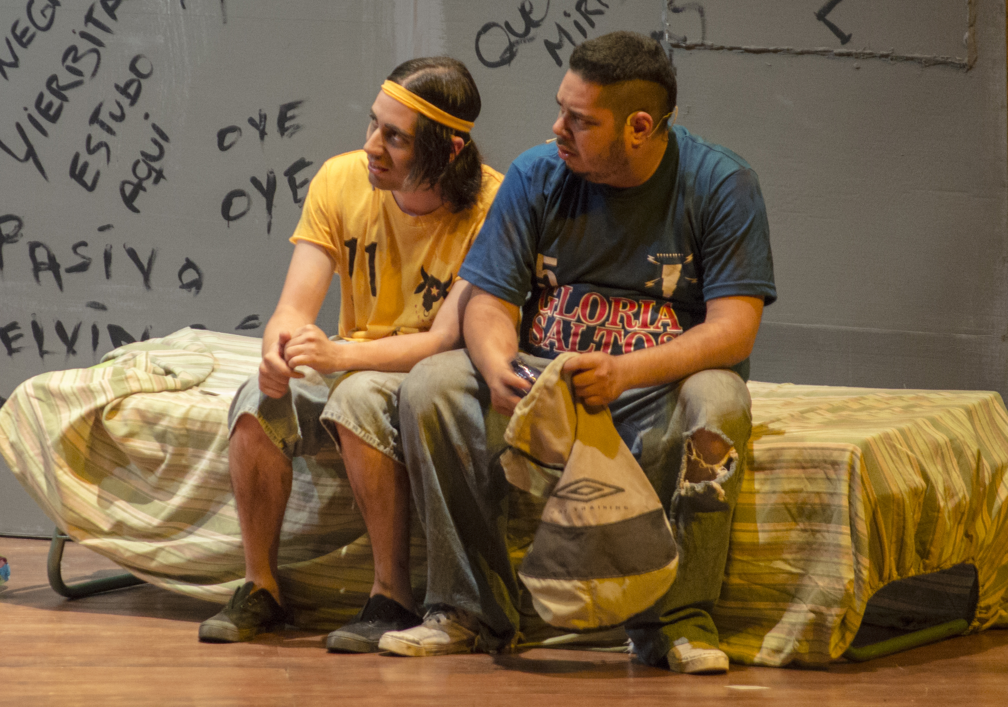 El grupo de teatro Actantes con su obra "Al sur del pozo" puesta en escena en el Teatro Centro Cívico el 17 de octubre de 2014, con Víctor Aráuz en la izquierda y Fernando García en la derecha.